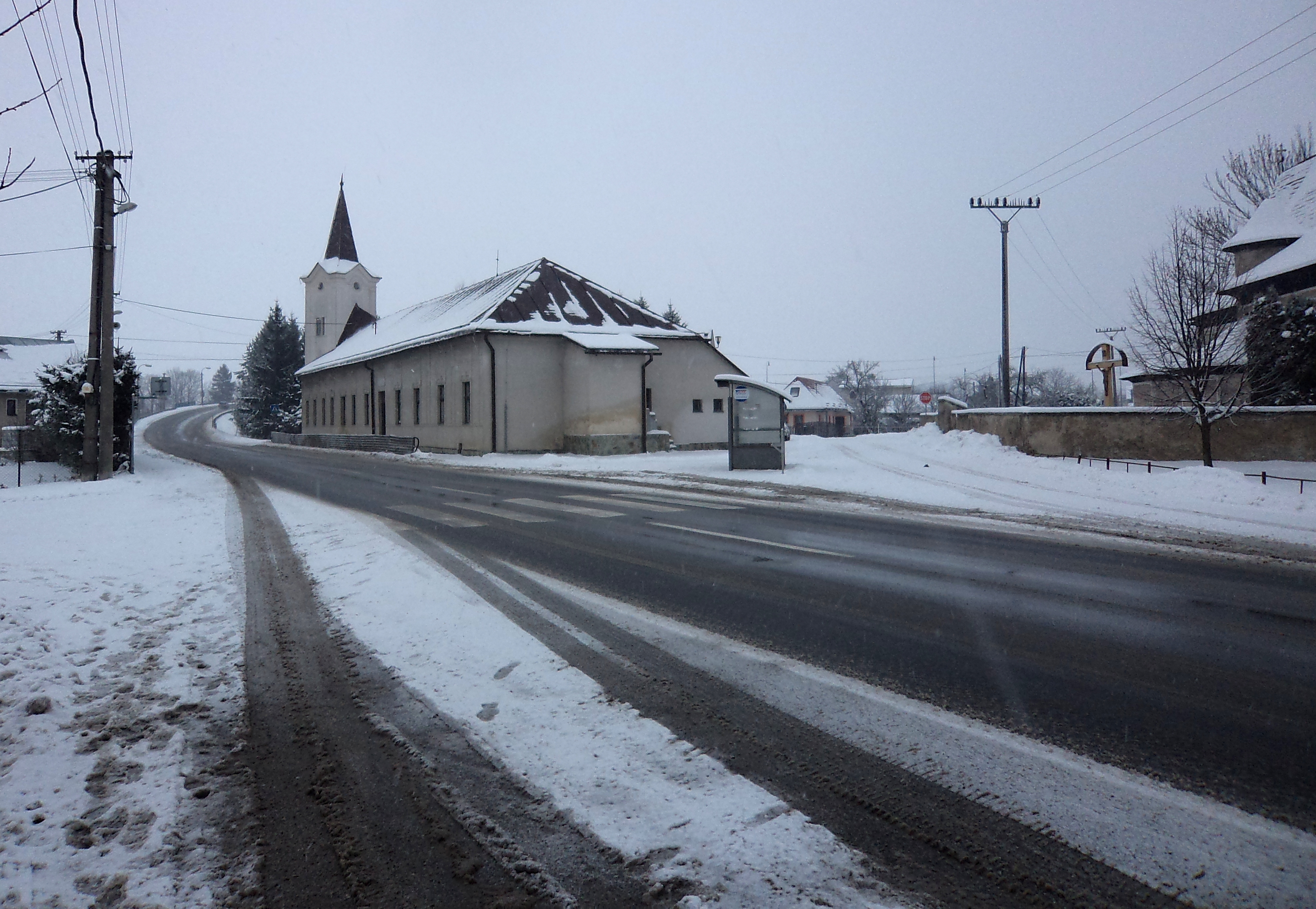 Príbovce